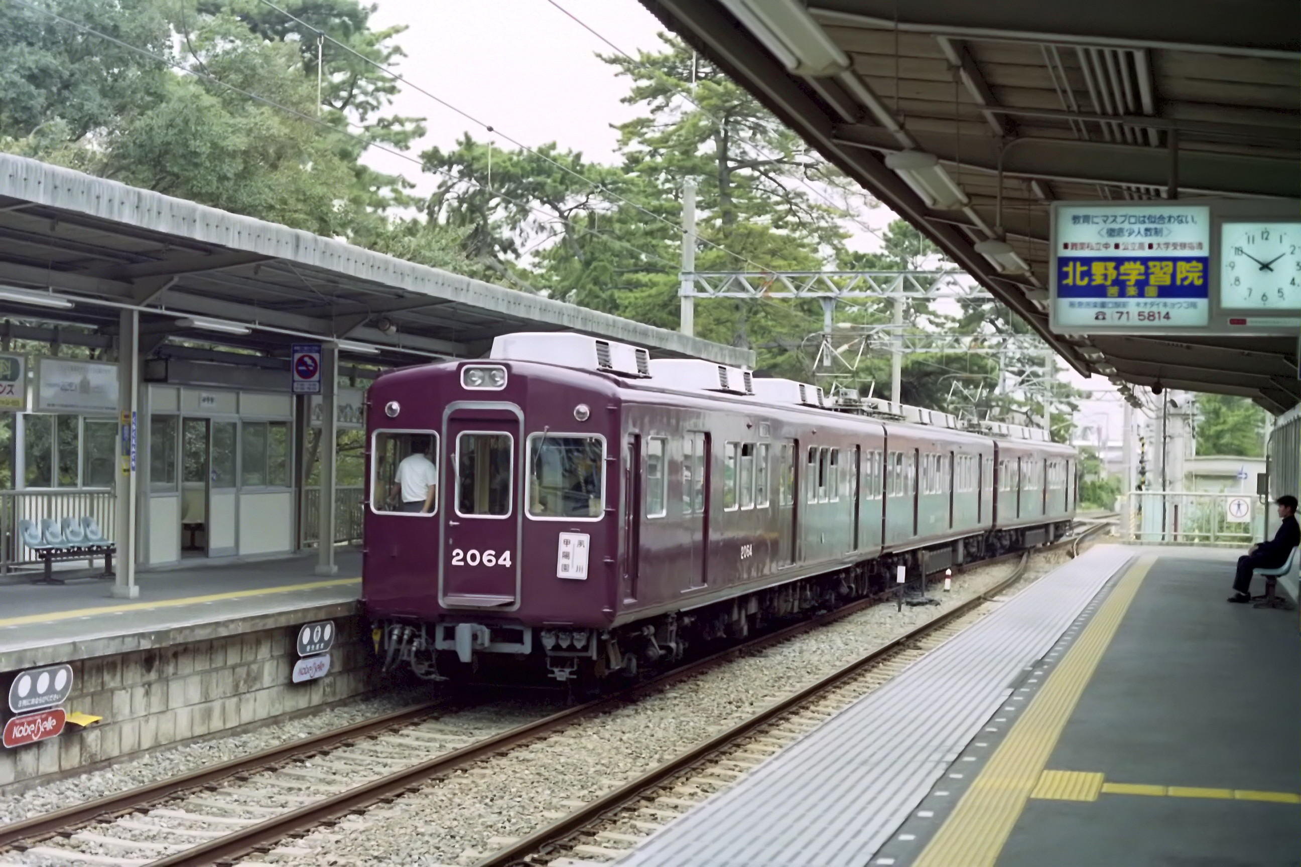 阪急2000系 1991年10月 苦楽園口駅